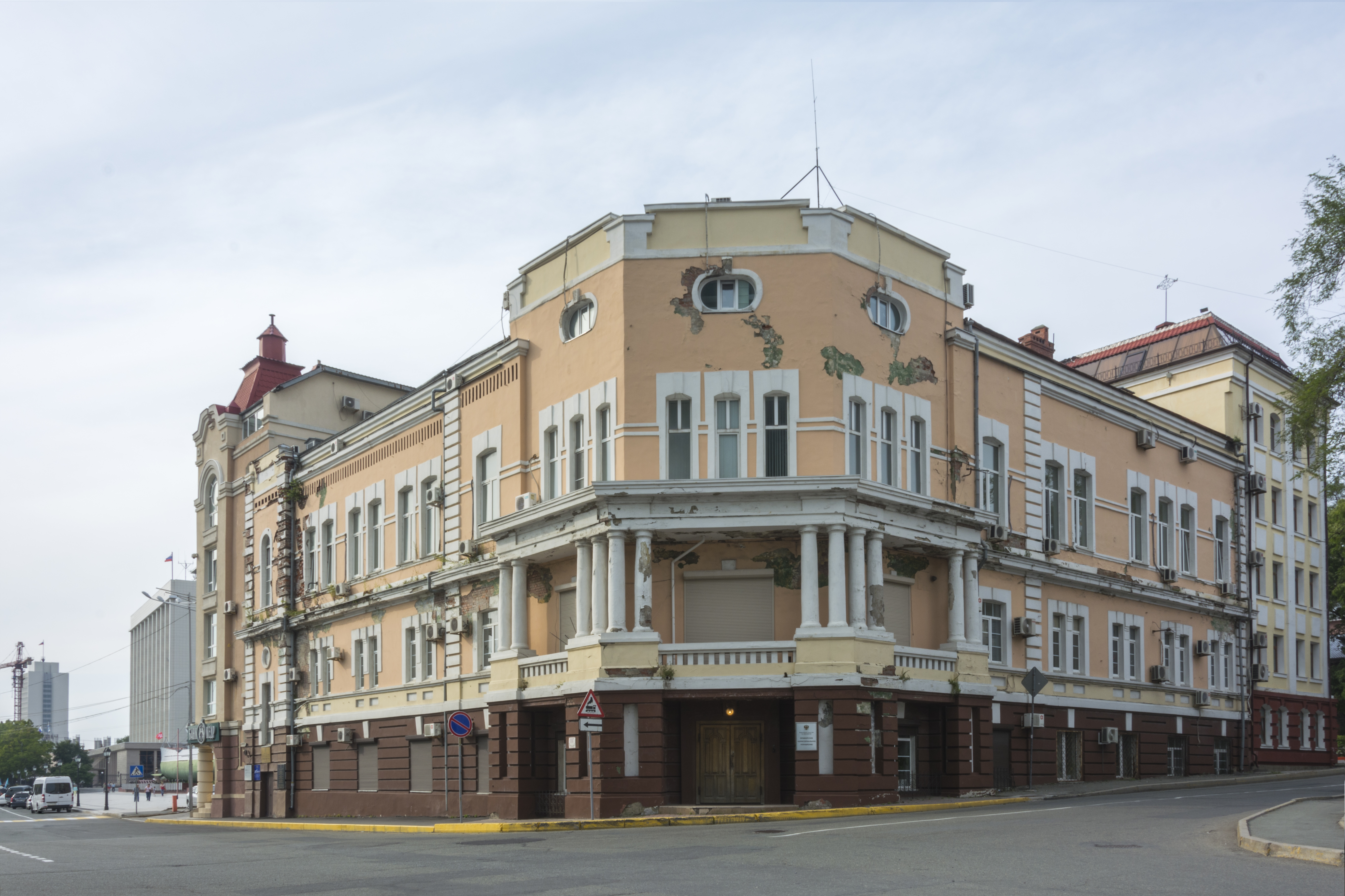 Дом, в котором жил исследователь Дальнего Востока В.К. Арсеньев: улица Петра Великого, 2, Владивосток, Приморский край